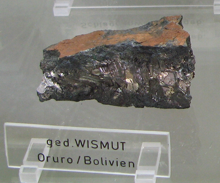 gediegen Bismut (Wismut) - Fundort: Oruro, Bolivien - Ausgestellt im Mineralogischen Museum Bonn